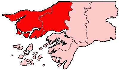 Mappa della diocesi cattolica di Bissau, in Guinea Bissau.